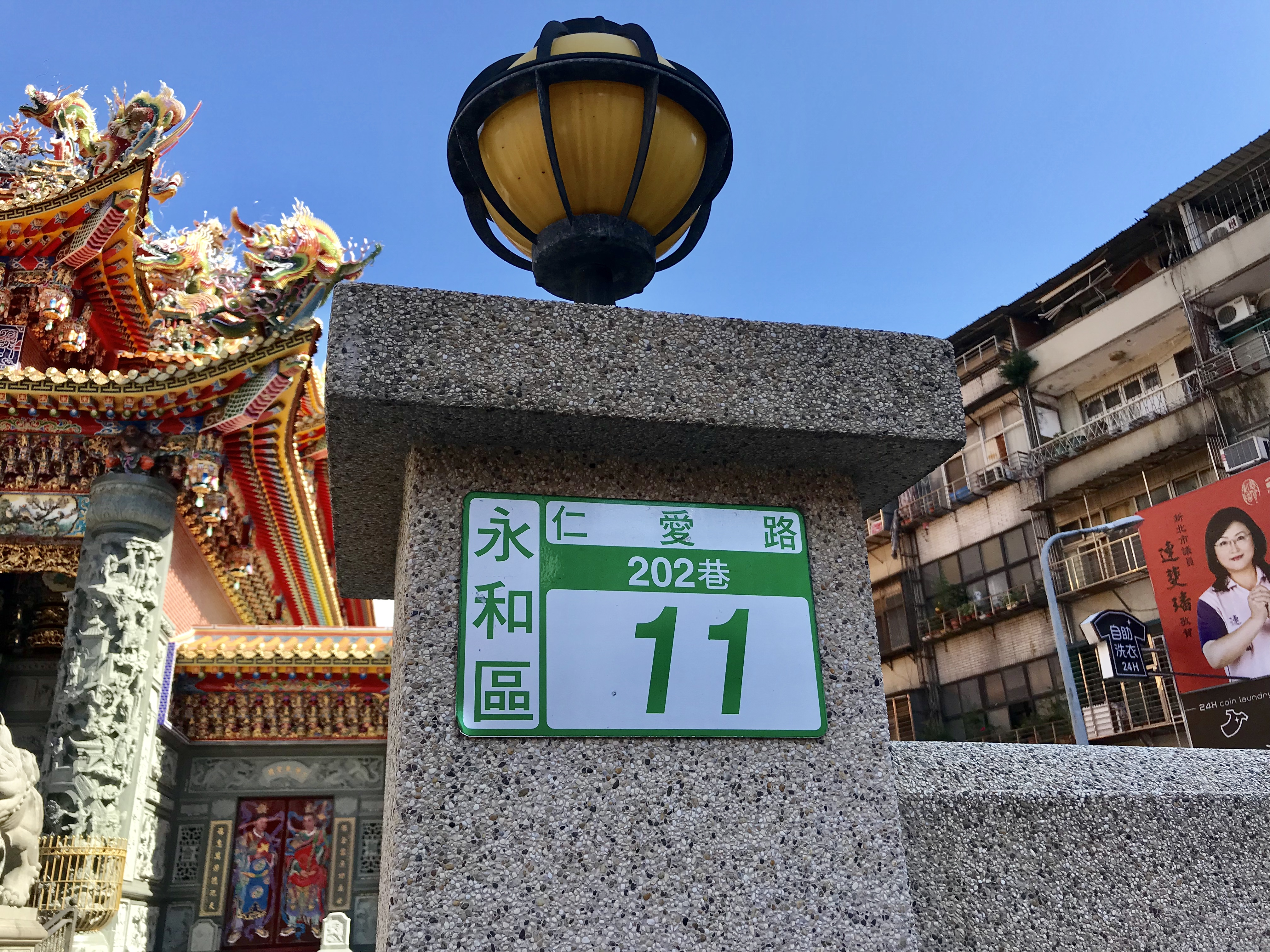 中文（台灣）: 永和保福宮門牌